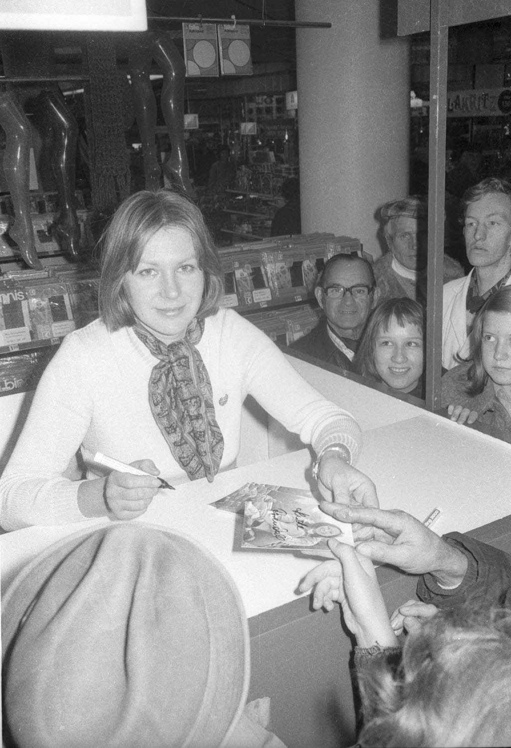 im Kaufhaus Karstadt.